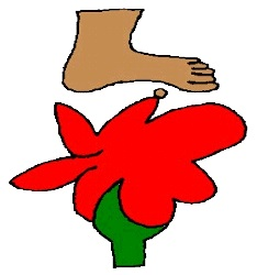 Glifo de Pisaflores, Hidalgo